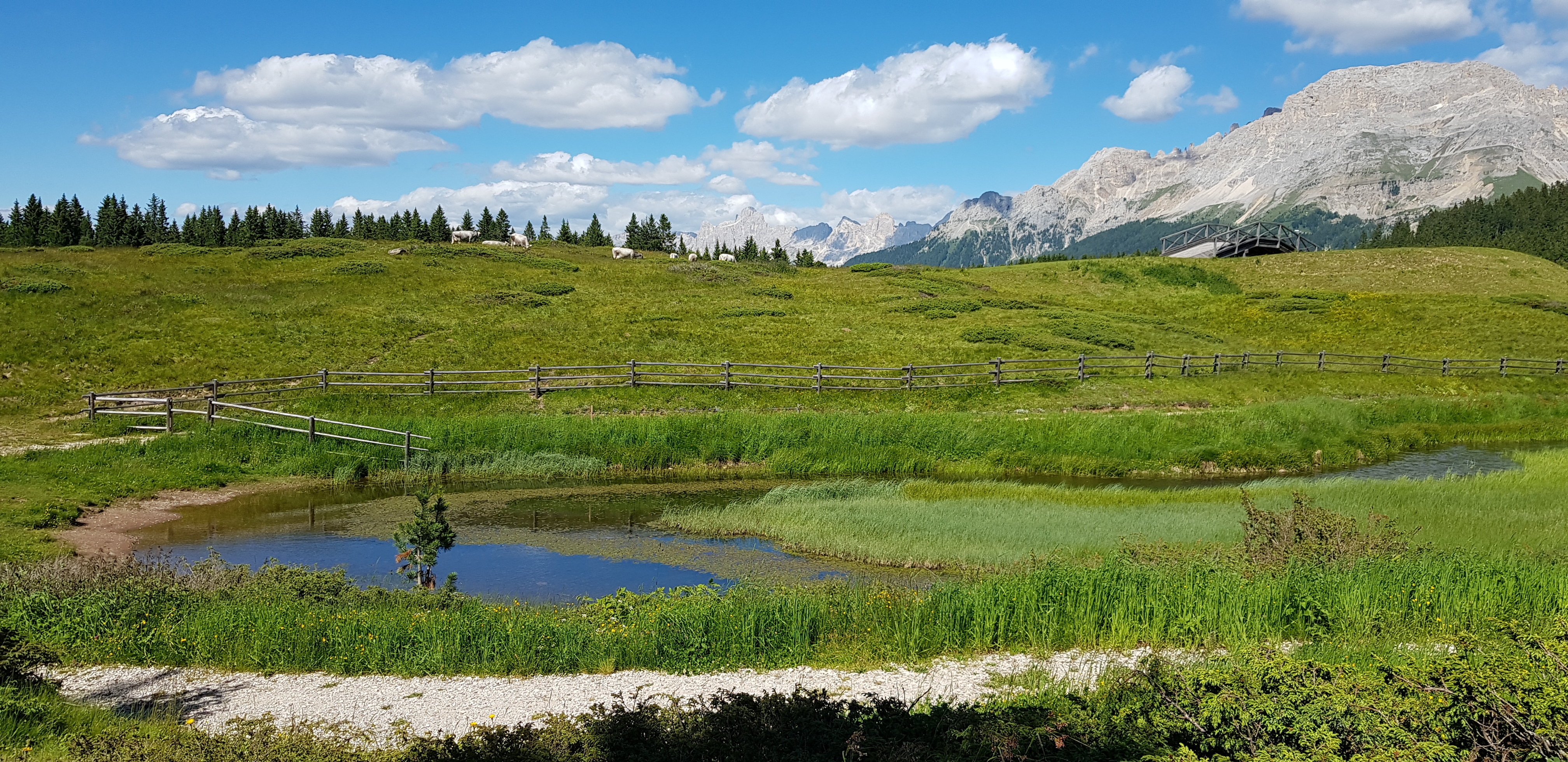 Torbiere del Lavaze' (Q49967605)